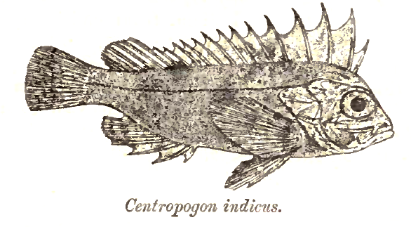 Centropogon indicus = Paracentropogon longispinis (Cuvier, 1829)